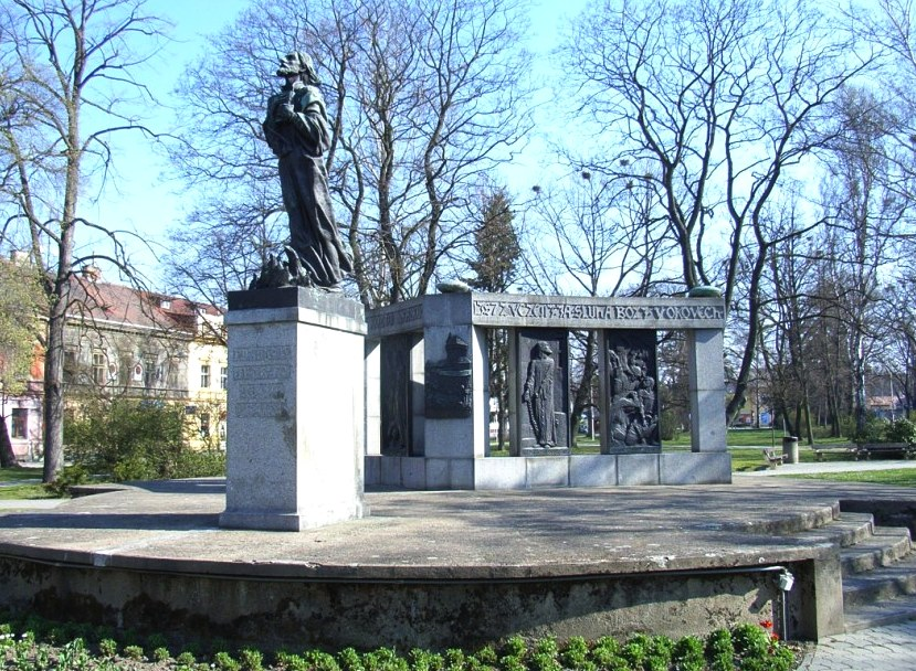 Monument Jan Hus-von Bildhauers František Bílek